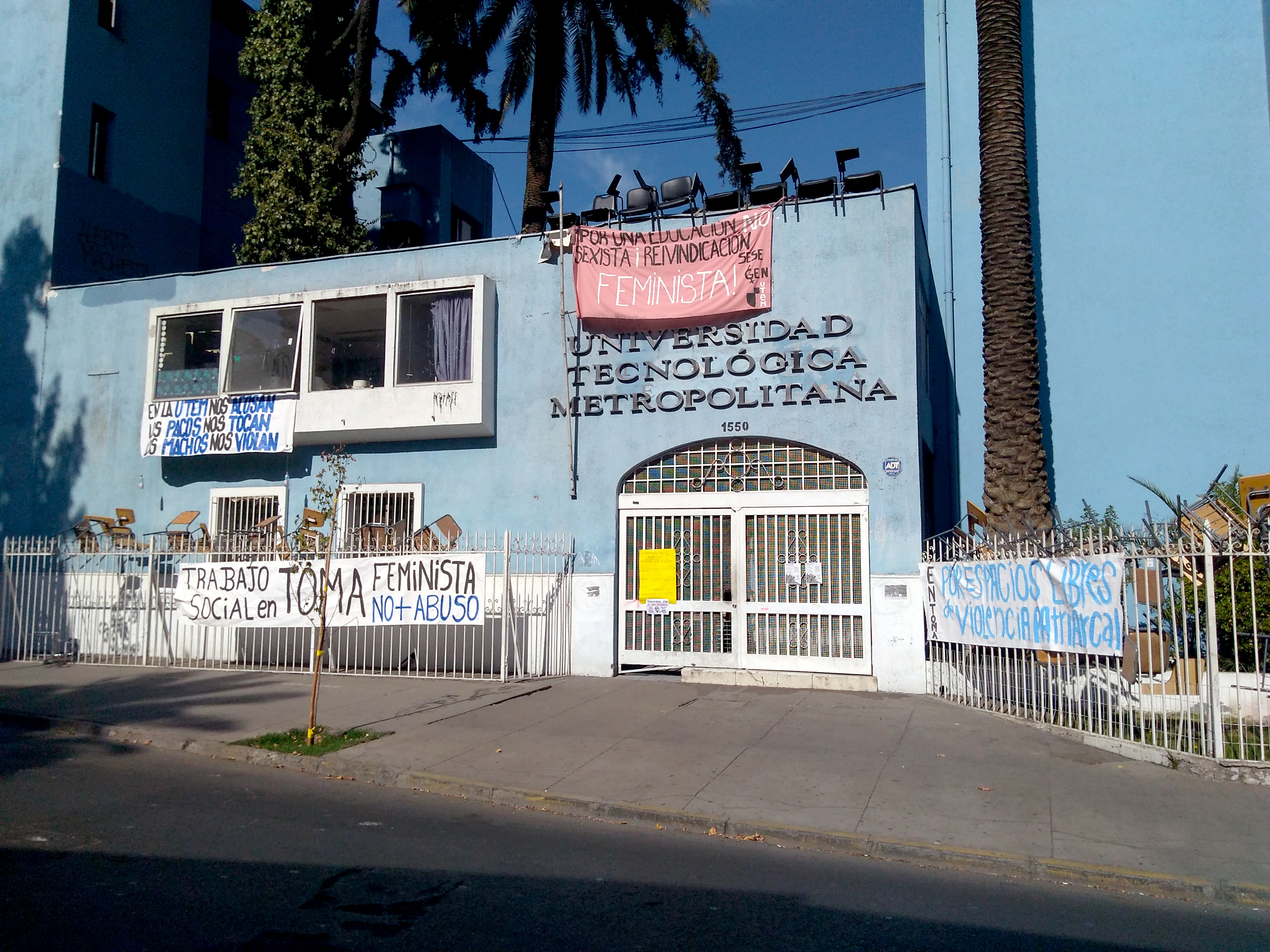 Toma de estudiantes feministas en sede de la UTEM.